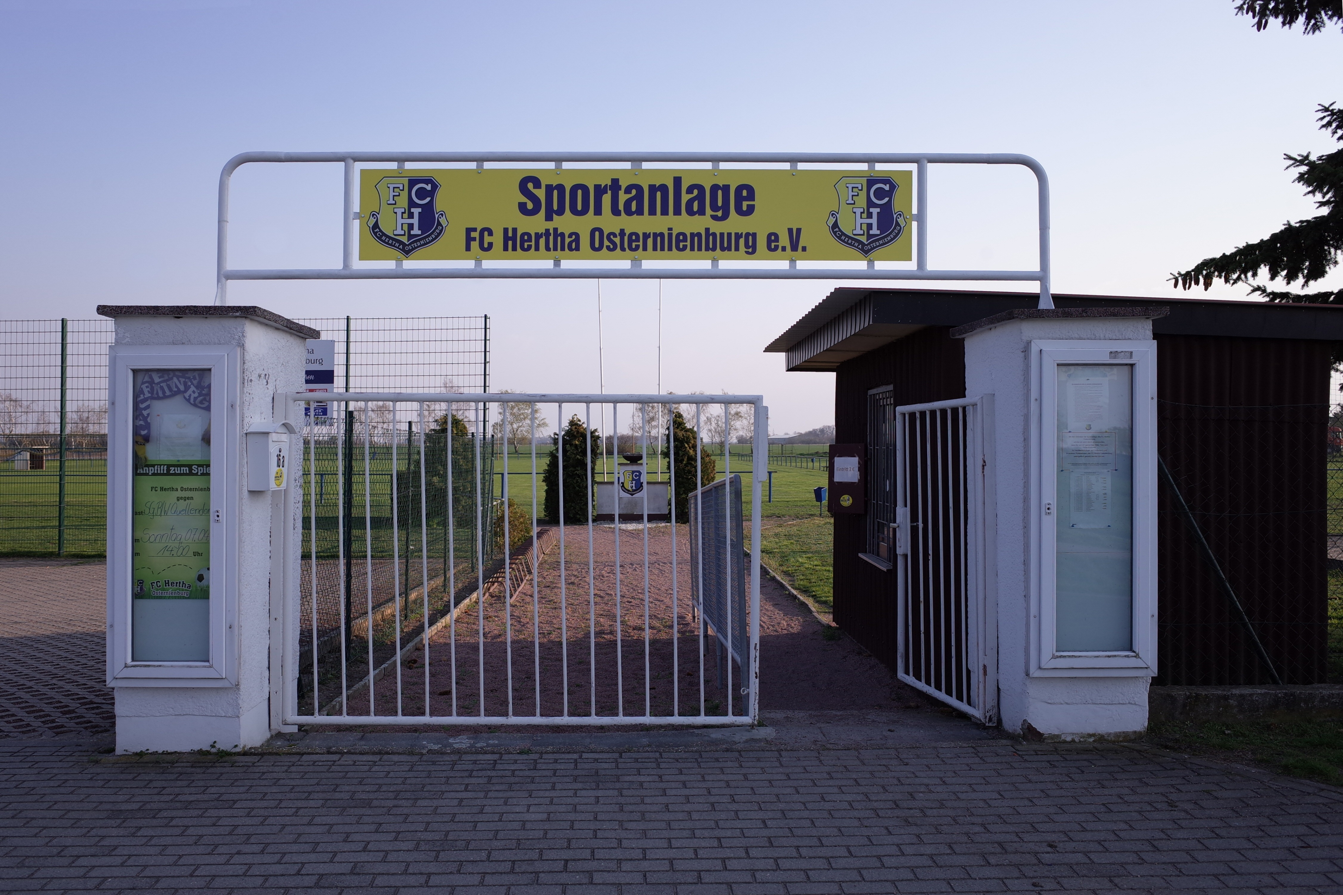 Osternienburg, Eingang zur Sportanlage vom FC Hertha Osternienburg